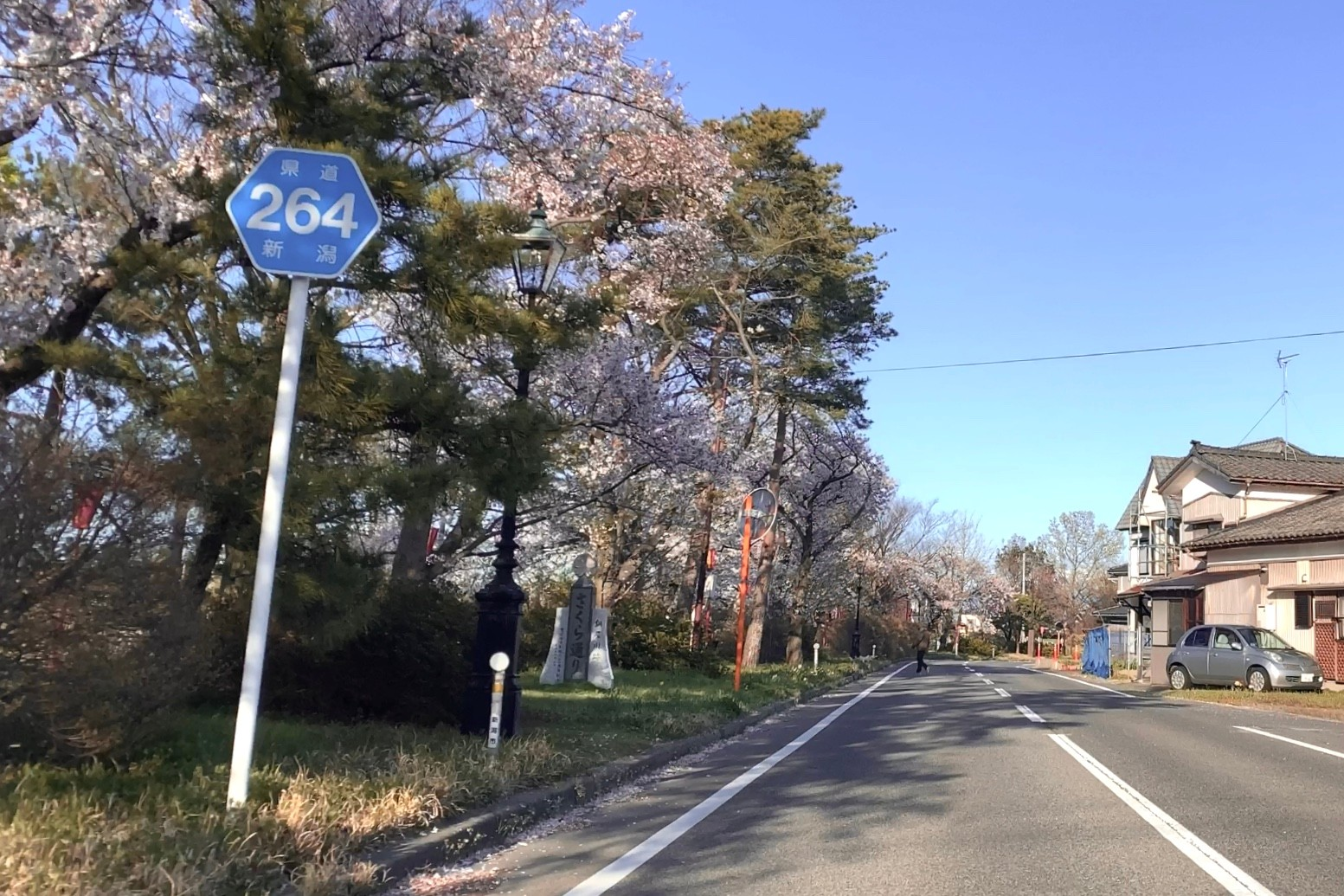 新潟県道264号豊栄天王線（葛塚東部緑道・旧銅屋川 さくら通り） 新潟市北区（2020年4月）